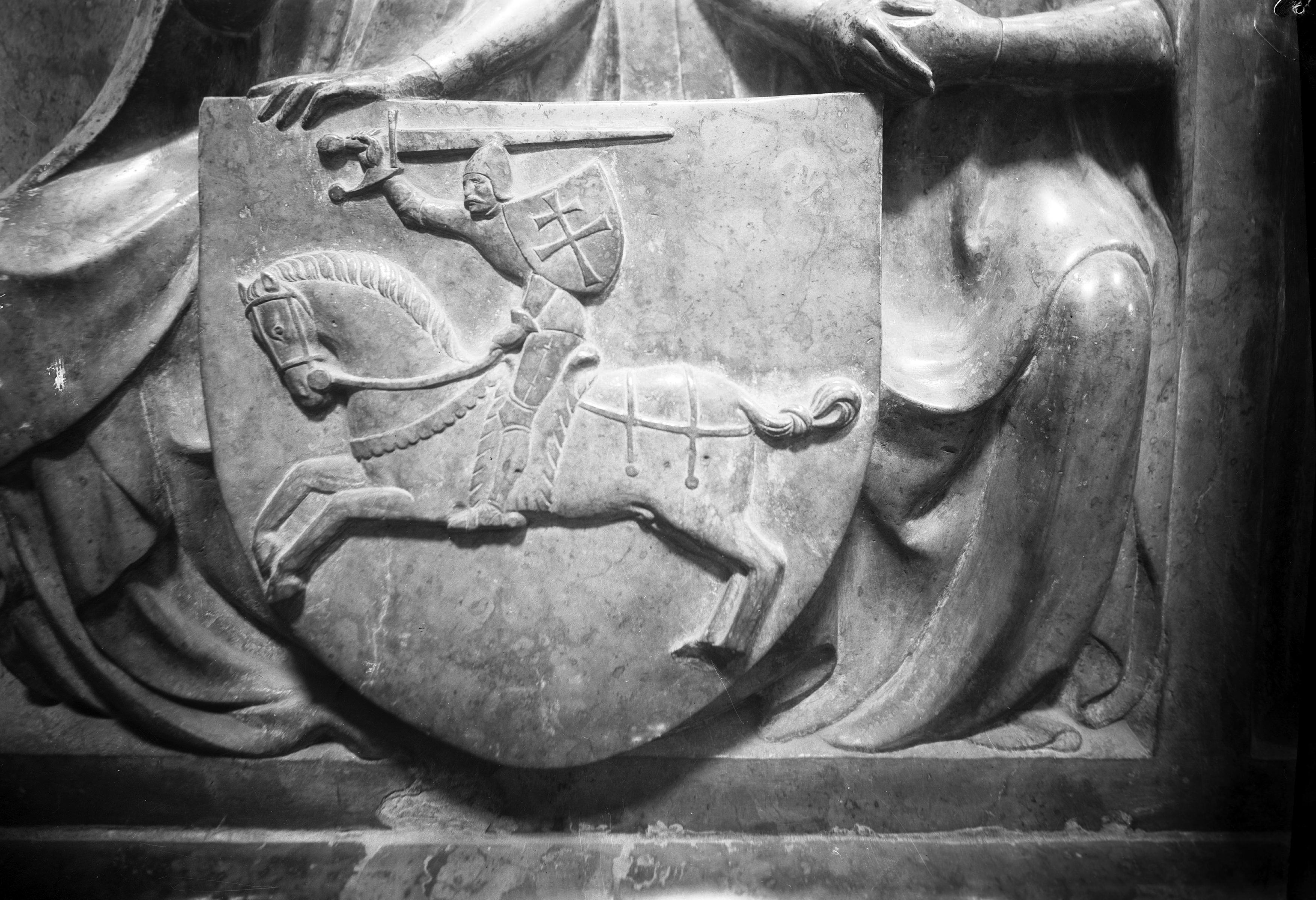 Fragment nagrobka Władysława Jagiełły w katedrze wawelskiej. Widoczny herb Pogoń będący znakiem Wielkiego Księstwa Litewskiego